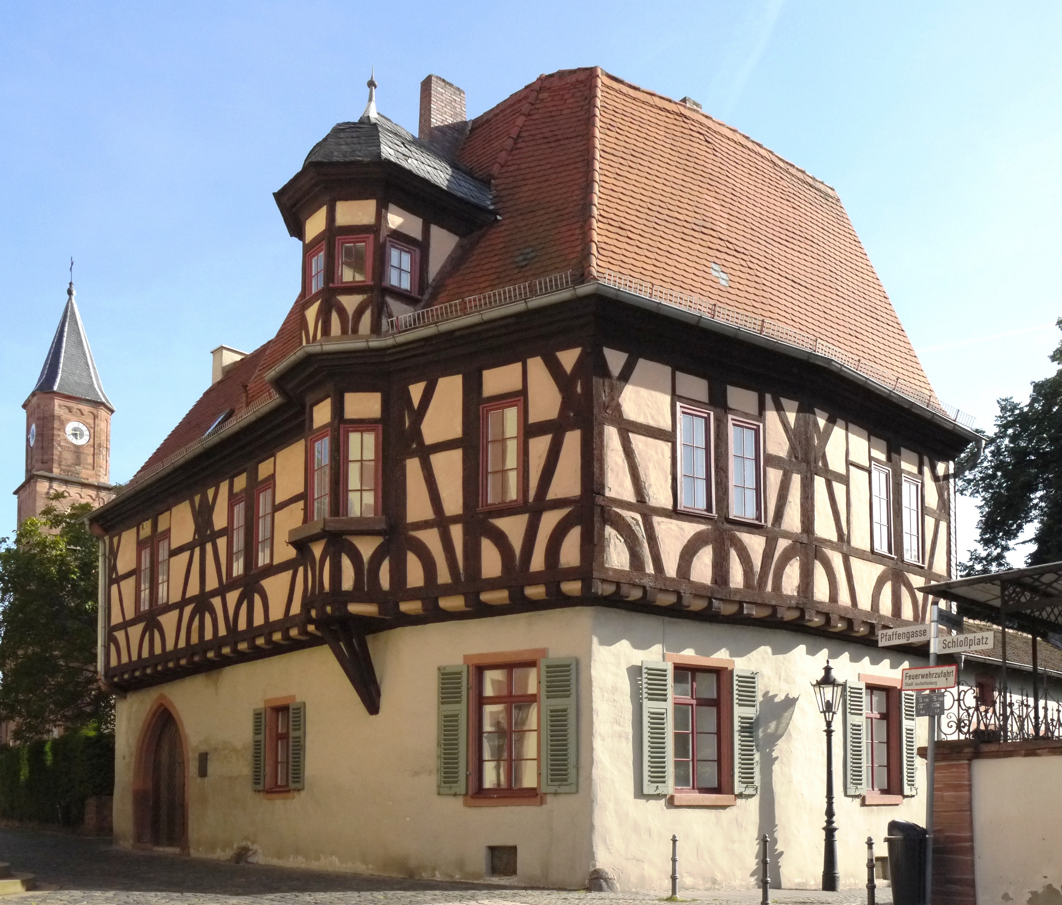 Pfaffengasse 19/Fürstengasse 3 (ehem. Kurie Starkenburg), denkmalgeschütztes Gebäude in Aschaffenburg